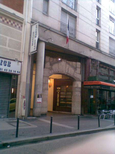 Une entrée du Marché de la Porte-Saint-Martin, Paris 10e arrondissement